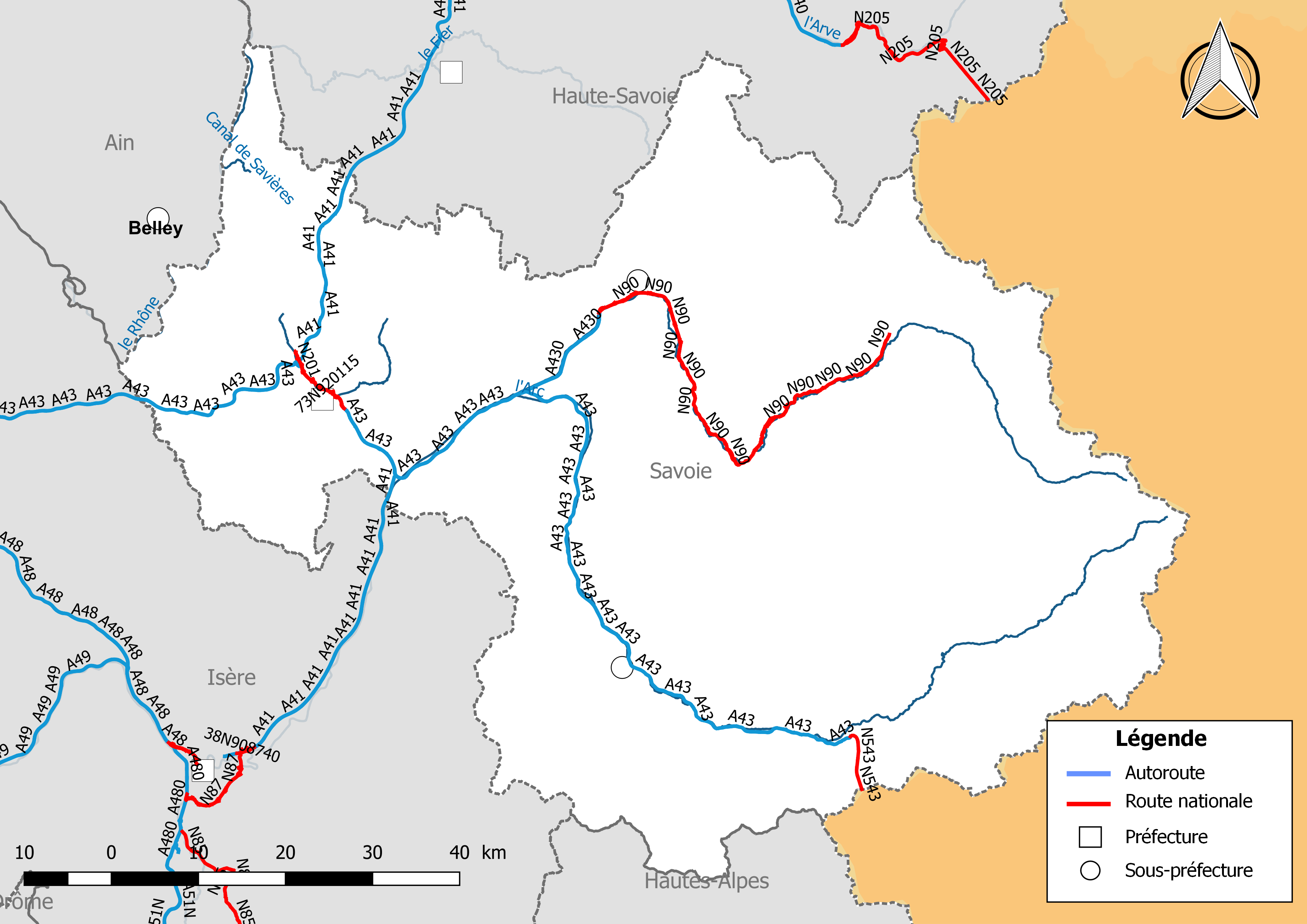 Carte du réseau routier national, constitué des autoroutes et des routes nationales, dans le département de la Savoie (France). Situation au 1er janvier 2019.